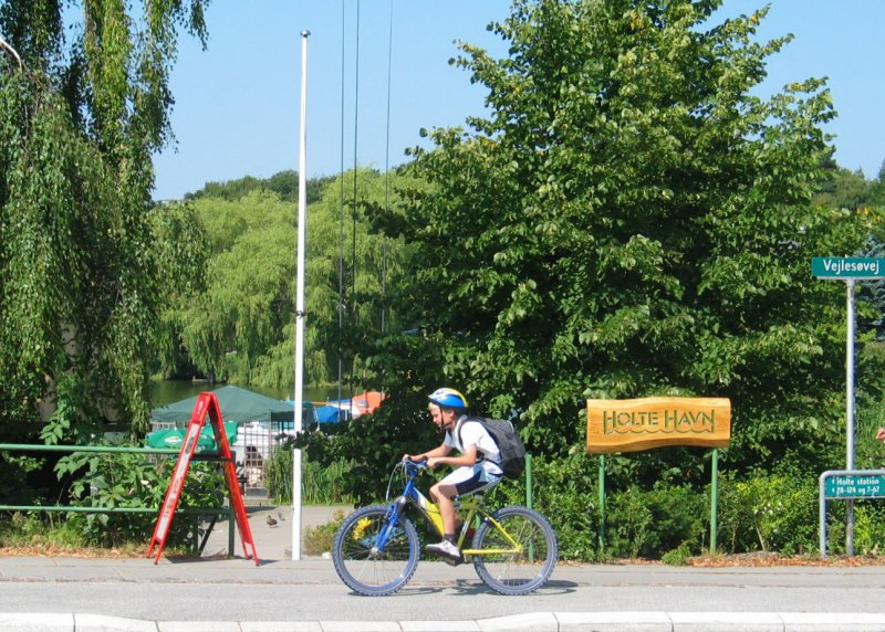 Holte Havn.